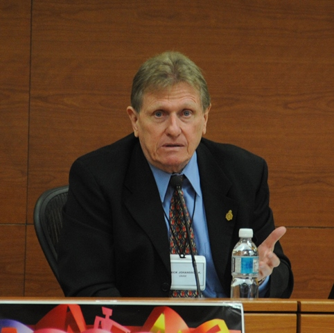 Patrick Johansson K. en el segundo Coloquio Internacional “Nuevas narrativas mexicanas: desde la diversidad” en el ITESM-Campus Ciudad de Mexico